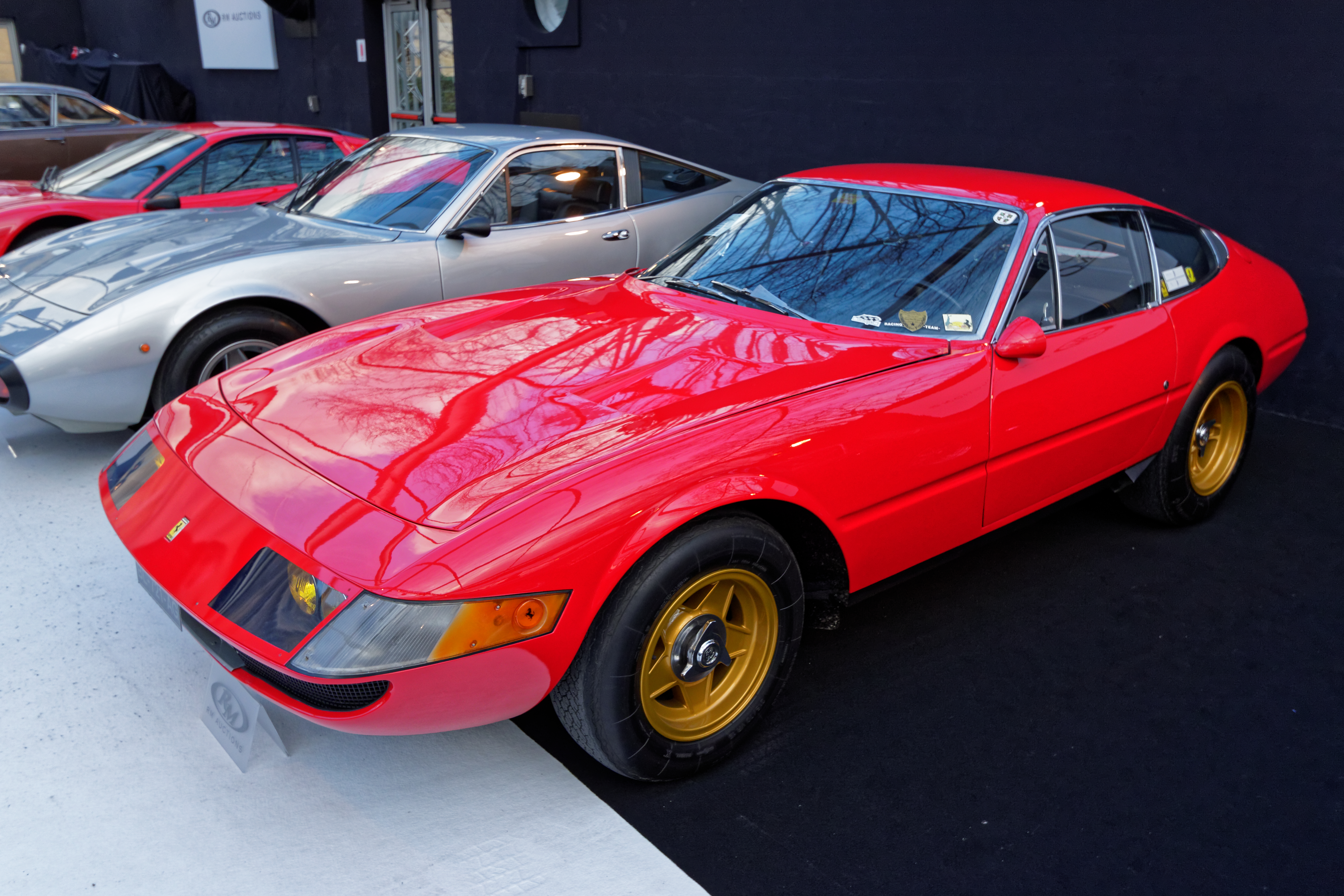 La vente aux enchères RM auctions aux pied des Invalides à Paris le 4 février 2015.